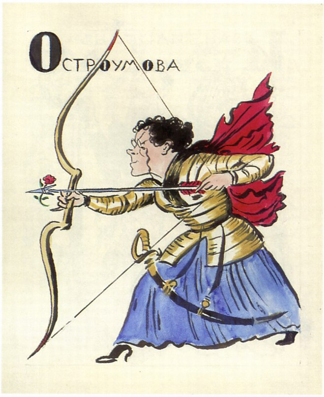 В 1911 г. Мстислав Добужинский составляет "Азбуку Мира Искусства". Это серия акварельных шаржей на "мирискуссников", которые Добужинский сопроводил небольшими стихотворными комментариями. А. Александр Бенуа, Б. Леон Бакст, В. Водкин-Петров и так далее до литеры Я, под которой значится Степан Яремич.